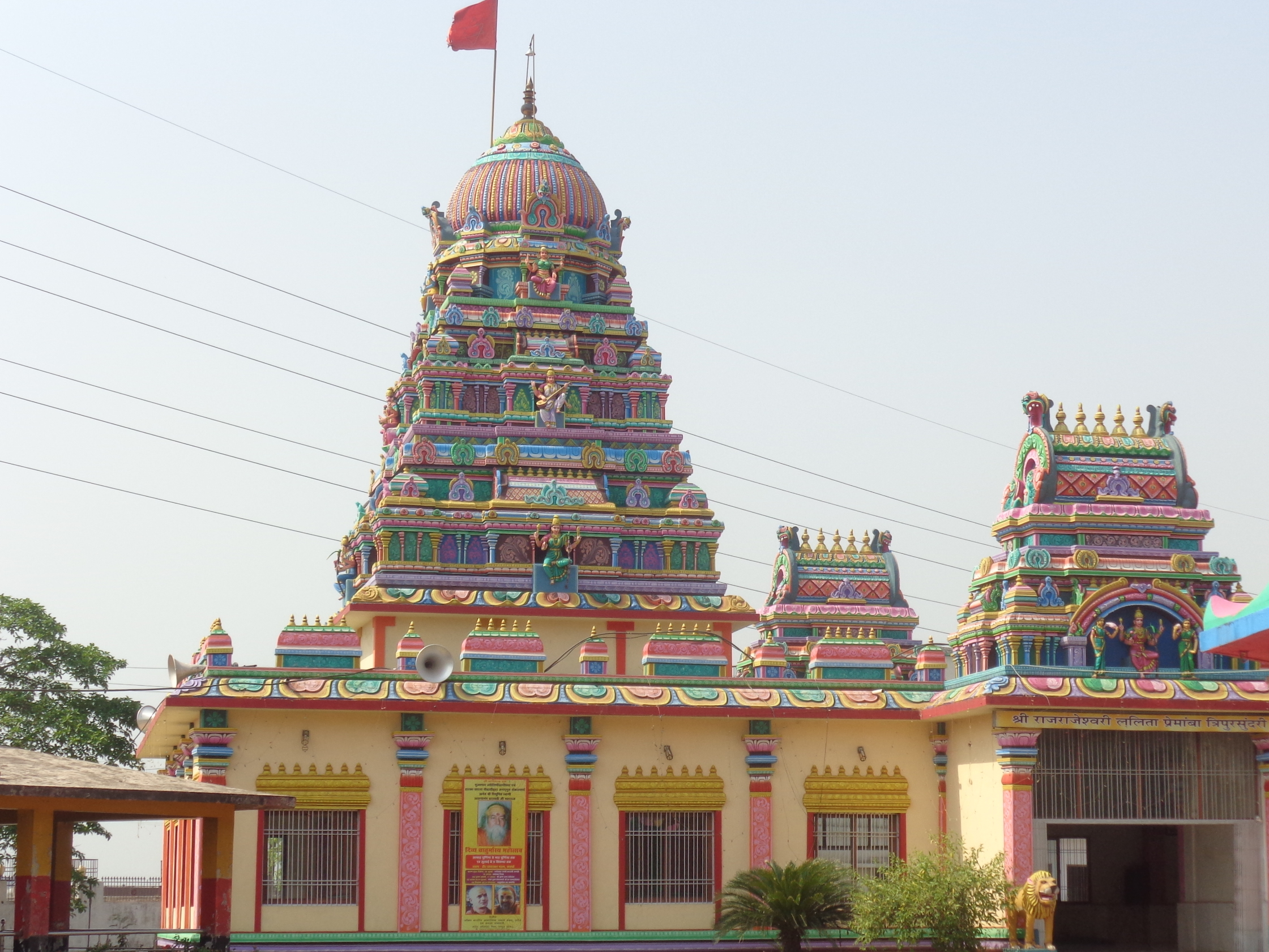 Sankaracharya asram, naya raipur, chattisgarh